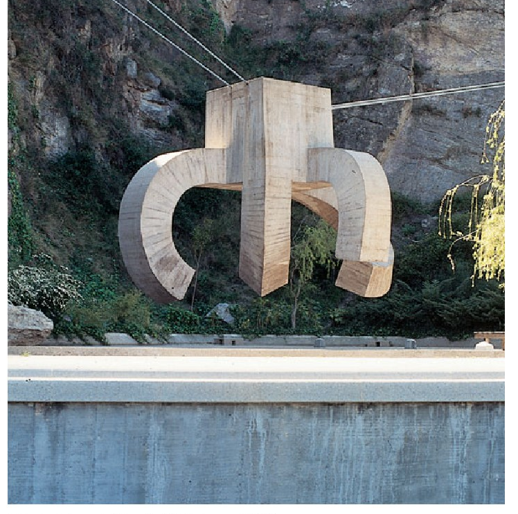 “Elogio del agua”, Eduardo Chillidarena (1987).